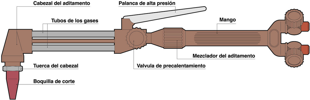 Soplete